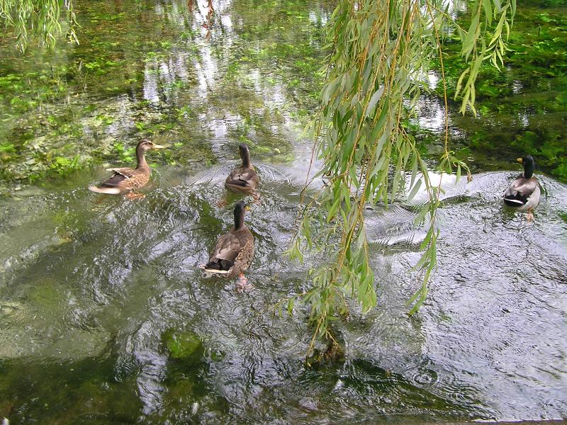 canards à Gensac